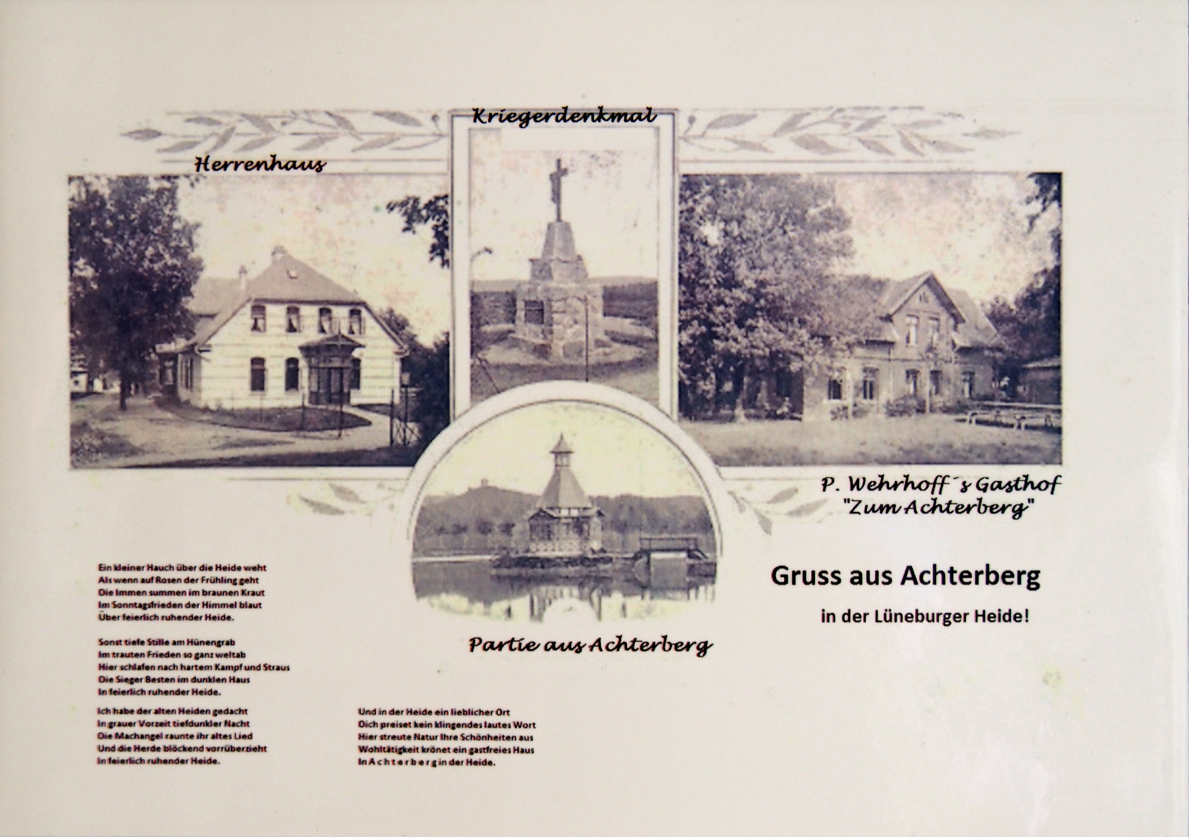 Alte Postkarte von Achterberg (Osterheide), heute Truppenübungsplatz Bergen